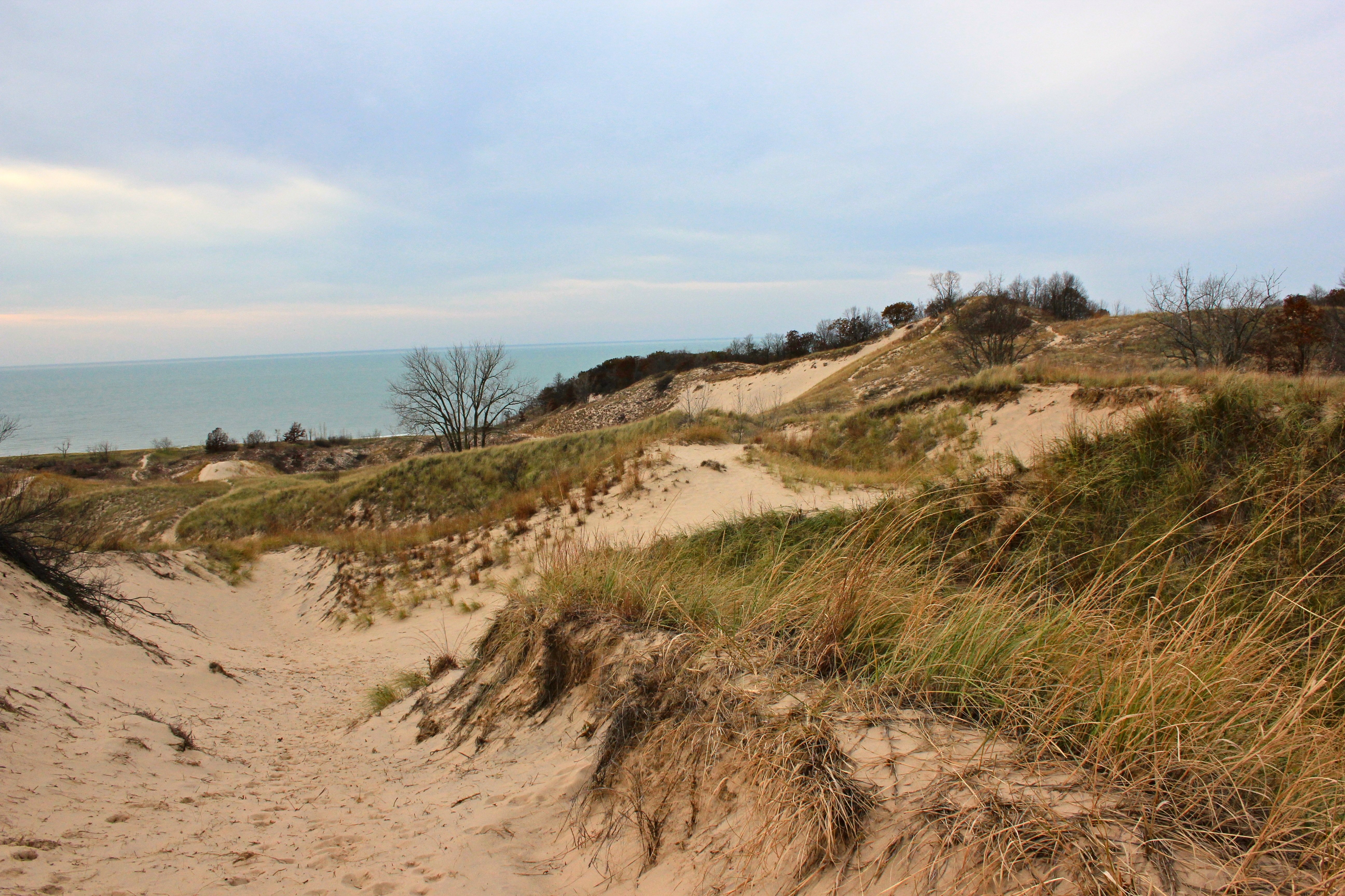 Warren Dunes